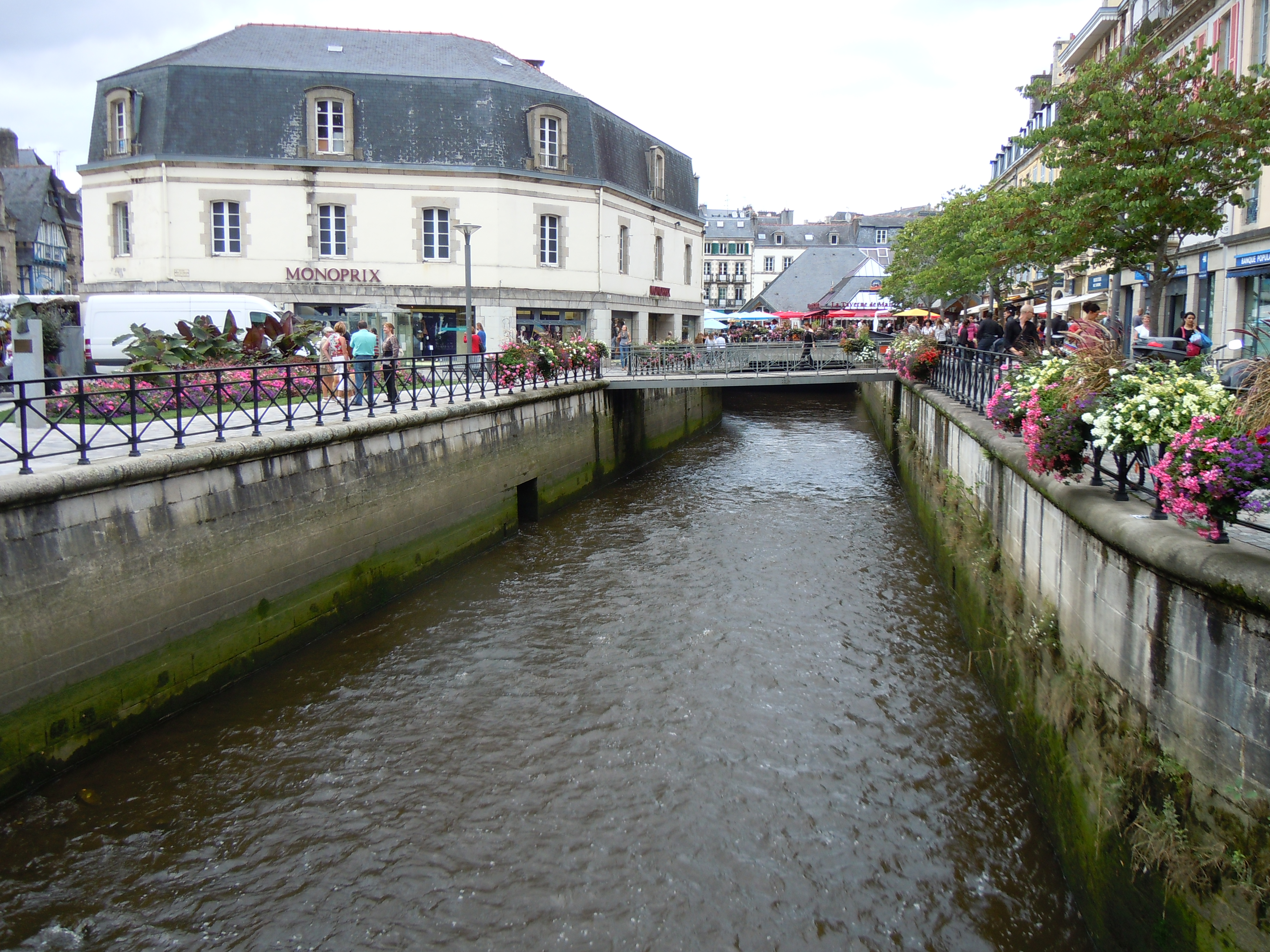 La rivière le steïr dans la ville de Quimper, Bretagne